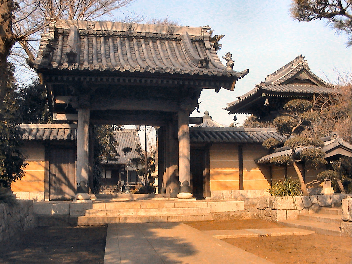 万福寺山門